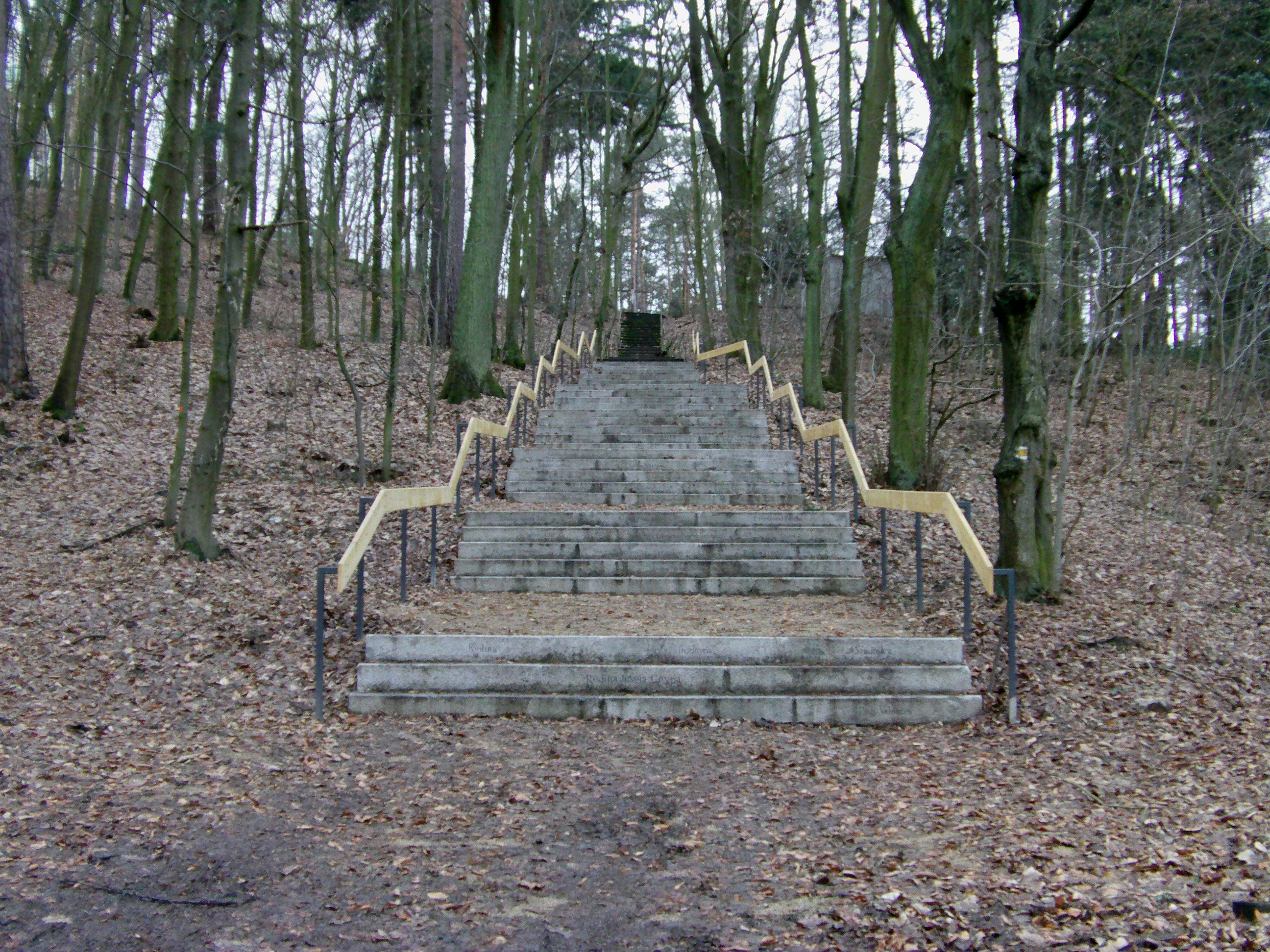 Schodiště se jmény donátorů vedoucích k poutnímu kostelu Navštívení Panny Marie na Vršíčku u Litohlav